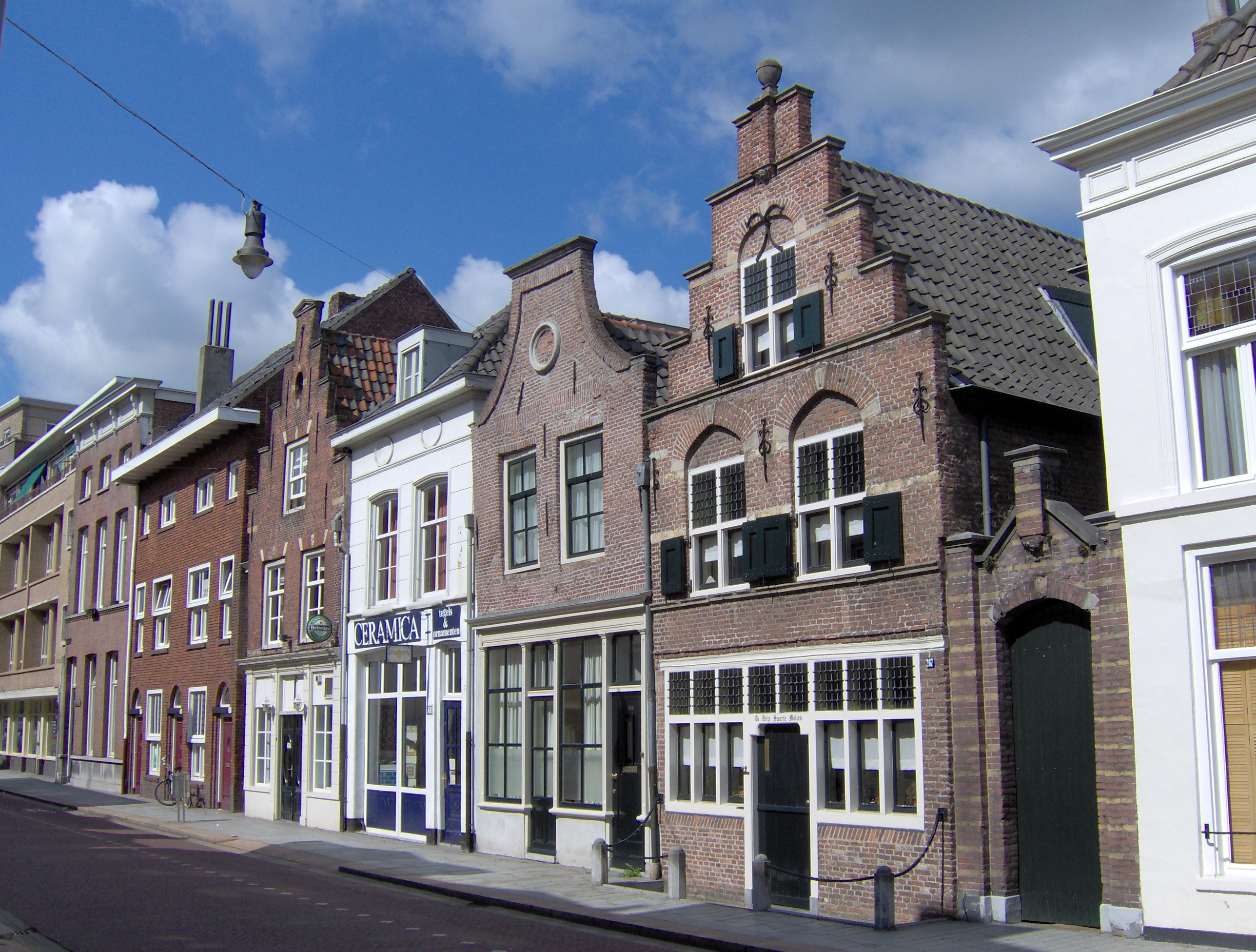 eigen foto categorie:afbeelding 's-Hertogenbosch